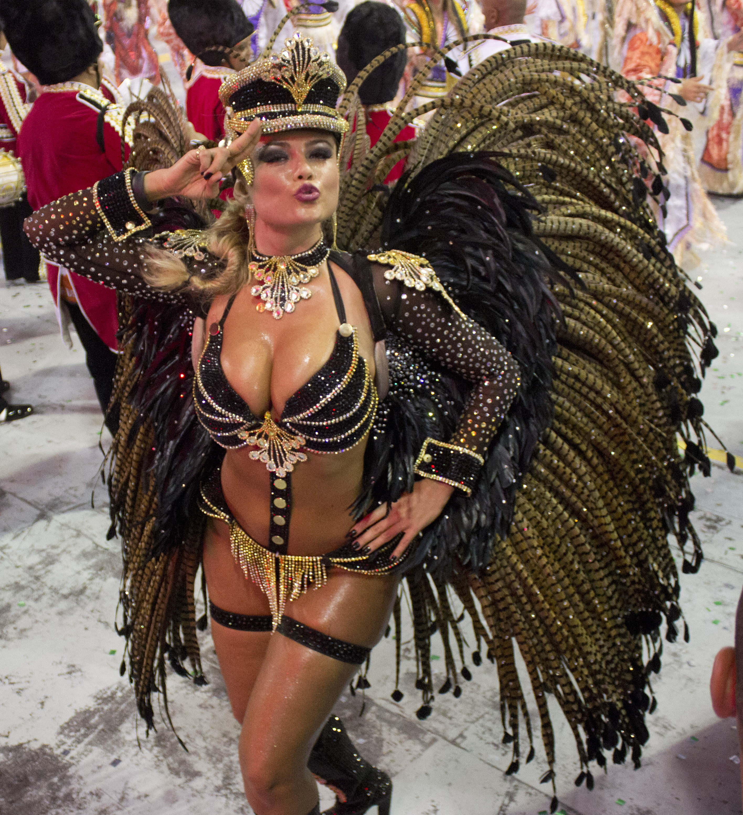 CARNAVAL 2013 - DESFILE ESCOLAS DE SAMBA - A escola de samba Rosas de Ouro desfila no sambódromo do Anhembi na zona norte da capital, na noite desta sexta feira (09), tendo como madrinha de bateria Hellen Roche. Foto: Jardiel Carvalho/CPN